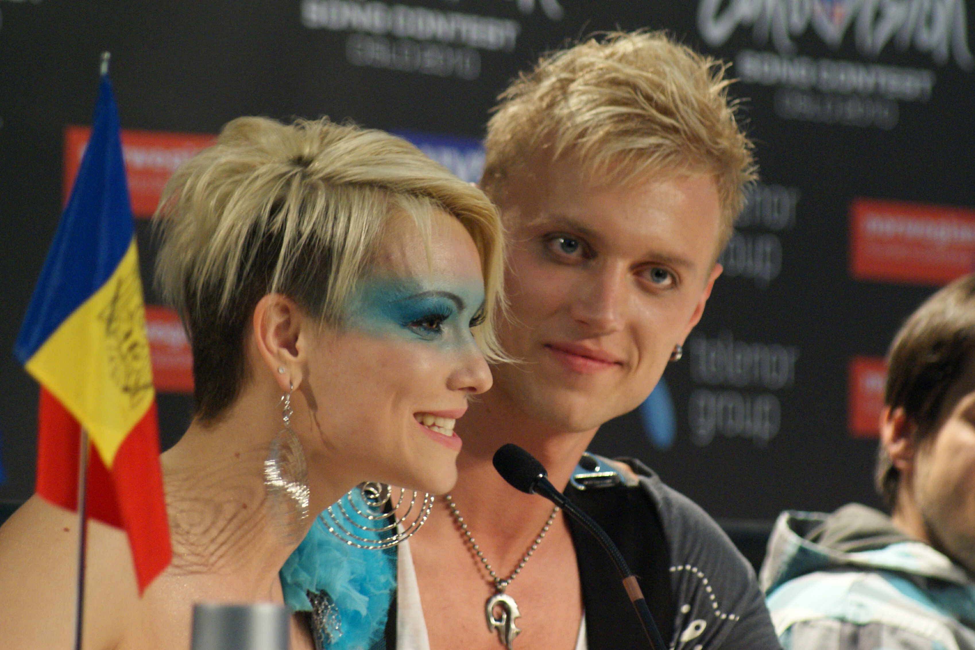 Olia Tira & Sergei Yalovitsky (Sunstroke Project)